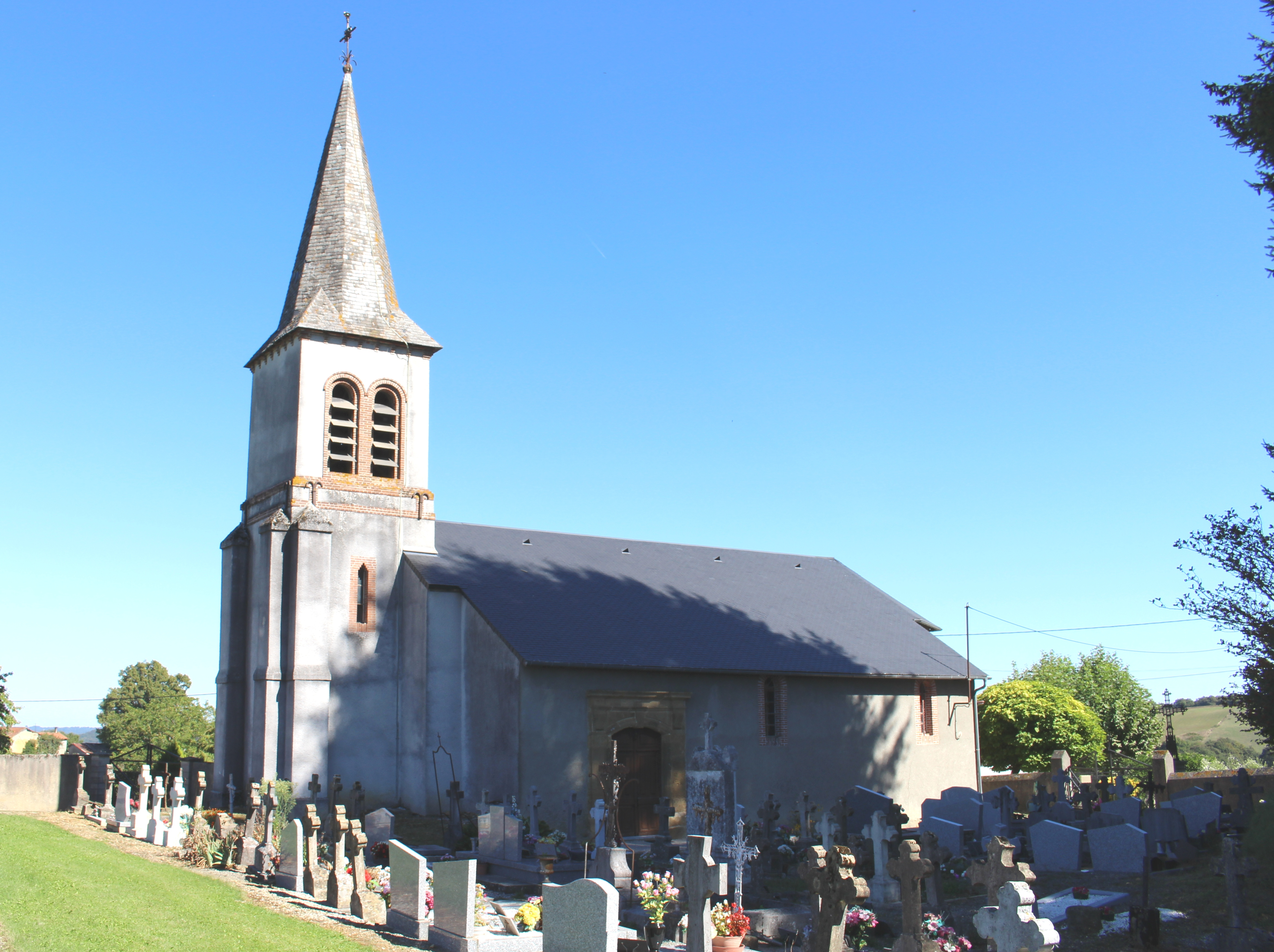 Église Martyre-de-Saint-Jean-Baptiste d'Orieux (Hautes-Pyrénées)